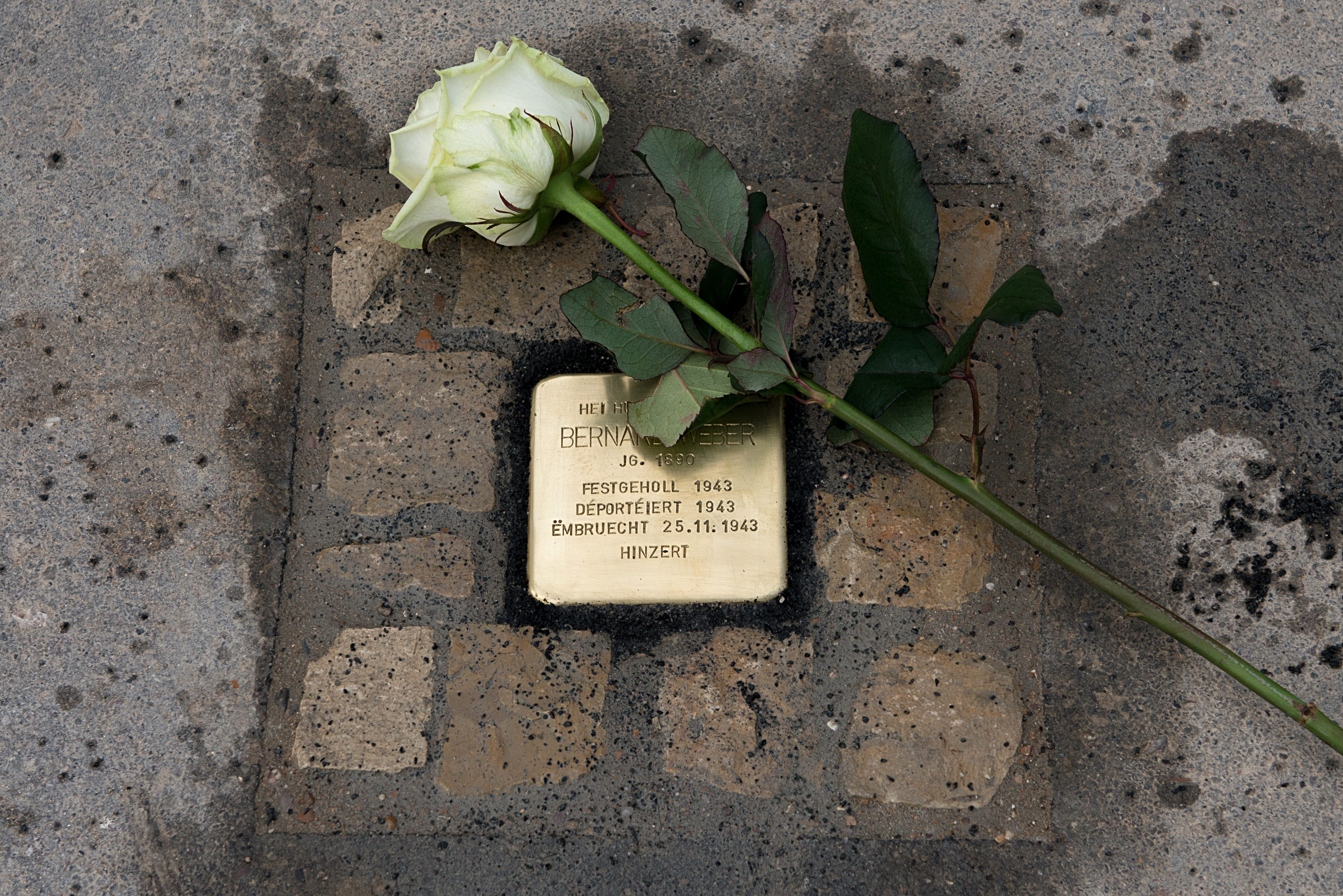 Als ofschléissend Aktioun am Kader vu "Mémoires communes - verfollegt, verdrängt, vergiess" huet d'Gemeng Munneref de 6. November 2015 eelef Stolpersteng vum däitsche Kënschtler Gunter Demnig verleeë gelooss. 18 Lokalassociatiounen hunn de Parrainage iwwerholl. De Bernard Weber, gebuer de 15. Oktober 1890 zu Haler, huet mat senger Fra, der Louise Molitor, an der Ellenger Strooss (haut rue John-Grün) zu Munneref gewunnt. D'Koppel hat ee Jong, de Roger, gebuer de 16. Abrëll 1923, wouduerch hien zu der Altersklass gehéert huet déi als éischt zwangsrekrutéiert goufen. Am Éischte Weltkrich huet de Bernard Weber an der franséischer Friemelegioun gekämpft, woufir hien 1922 mat der Médaille militaire ausgezeechent gouf. De Bernard Weber war ee vun de Käpp an der Munnerefer Resistenz. Den 22. Oktober 1943 gouf hie vun der Gestapo verhaft an an de Prisong am Gronn agespaart. Vu do gouf hien den 2. November 1943 an d'KZ Hinzert verschleeft, wou hin duerch d'sadistesch Brutalitéit vun den SS-Verbriecher de 25. November 1943 ëmkënnt. De 24. Oktober 1944, op der éischter Gemengerotsëtzung no der Liberatioun, gouf op Propositioun vun der Unio'n decidéiert d'"Place Flesgin" (Grous Plaz) a "Place Bernard-Weber" ëmzebenennen. De 25. November gouf d'Plaz feierlech ageweit. Seng stierflech Iwwerreschter goufen am September 1946 um Munnerefer Kierfecht begruewen. De Bernard Weber gouf posthum mam Ordre de la Résistance ausgezeechent.